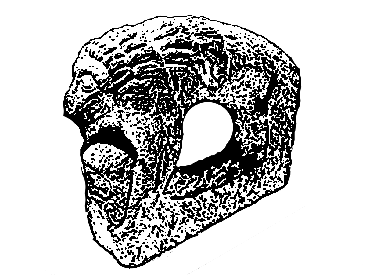 León de Bienservida o de Huerta Bayonas, depositado en el Museo Provincial de Albacete